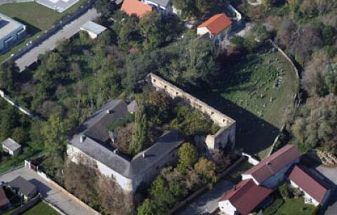 Altes Schloß (Kittsee)